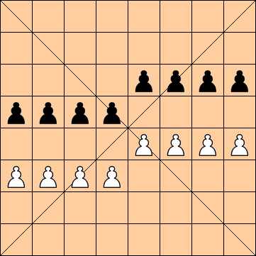 Diagrama de la posición inicial del Ajedrez Birmano ("Sittuyin") creado con peones del Standar Chess Diagram.